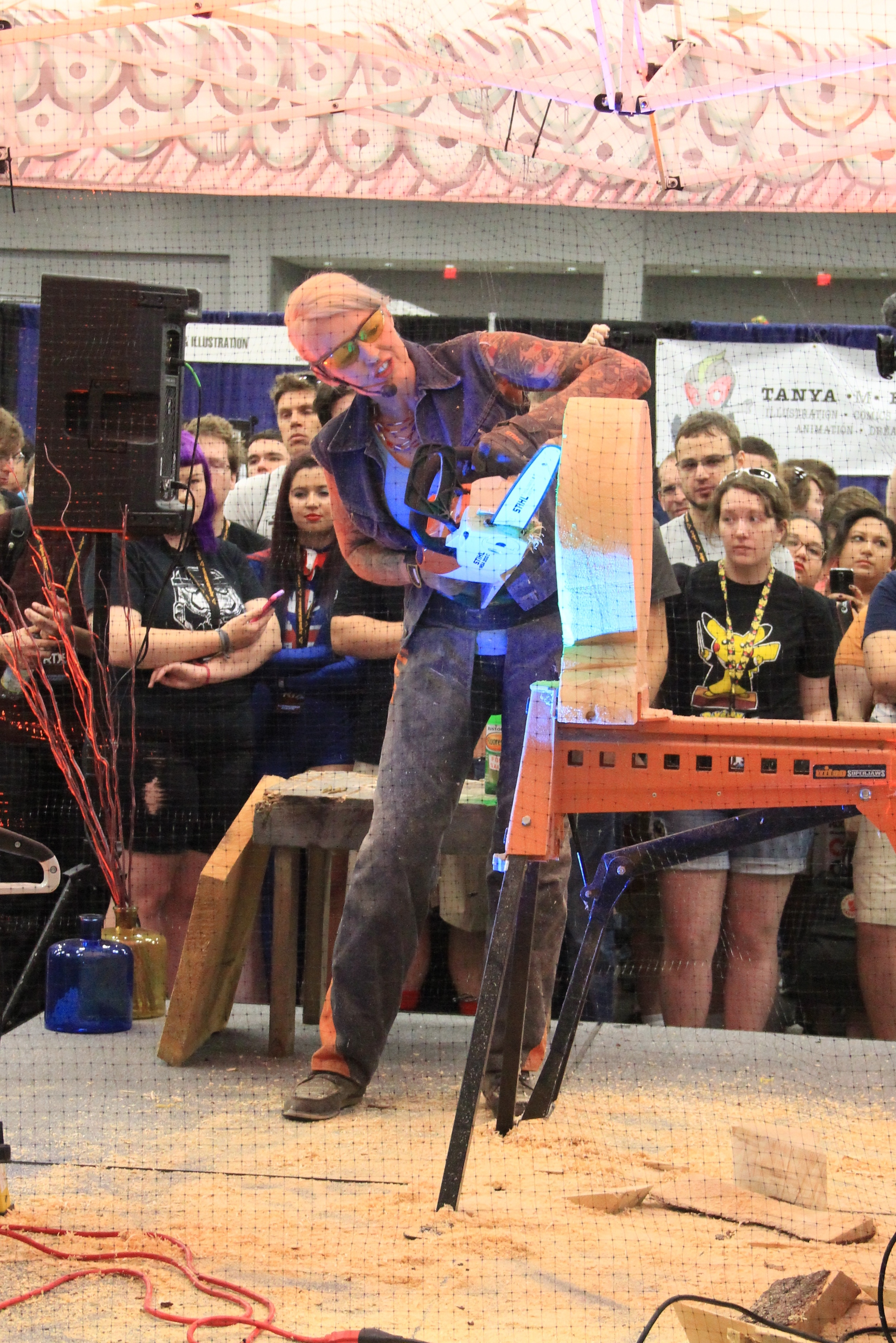 IMG_4789 Taken at RTX 2015.